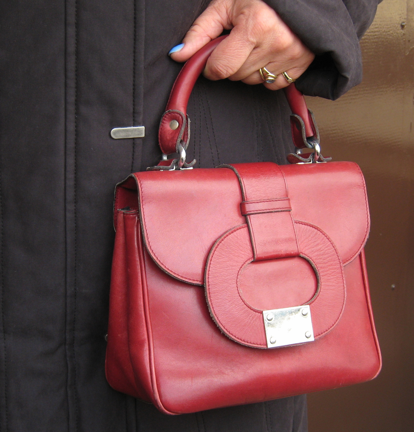 Damenhandtasche (Henkeltasche) von Godpfeil aus den 1970ern